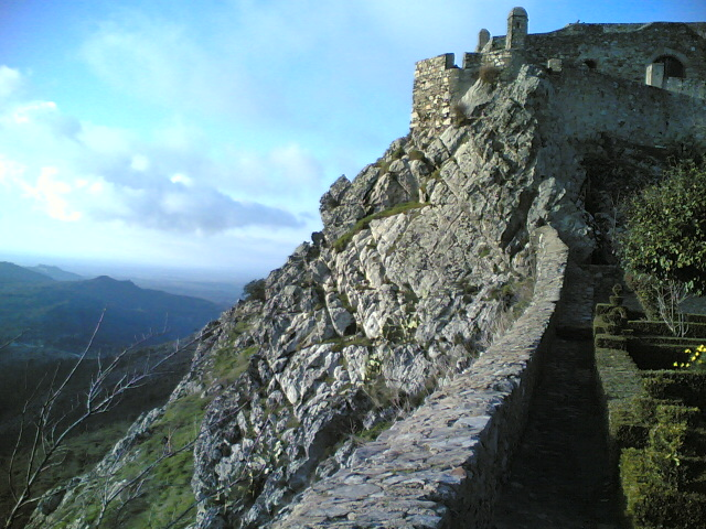 Muralha de Marvão, em Portugal. The walls of Marvão, in Portugal.